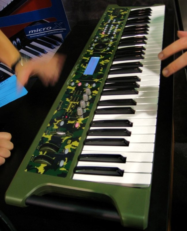 Korg X50 Camouflage @ NAMM 2008 Winter